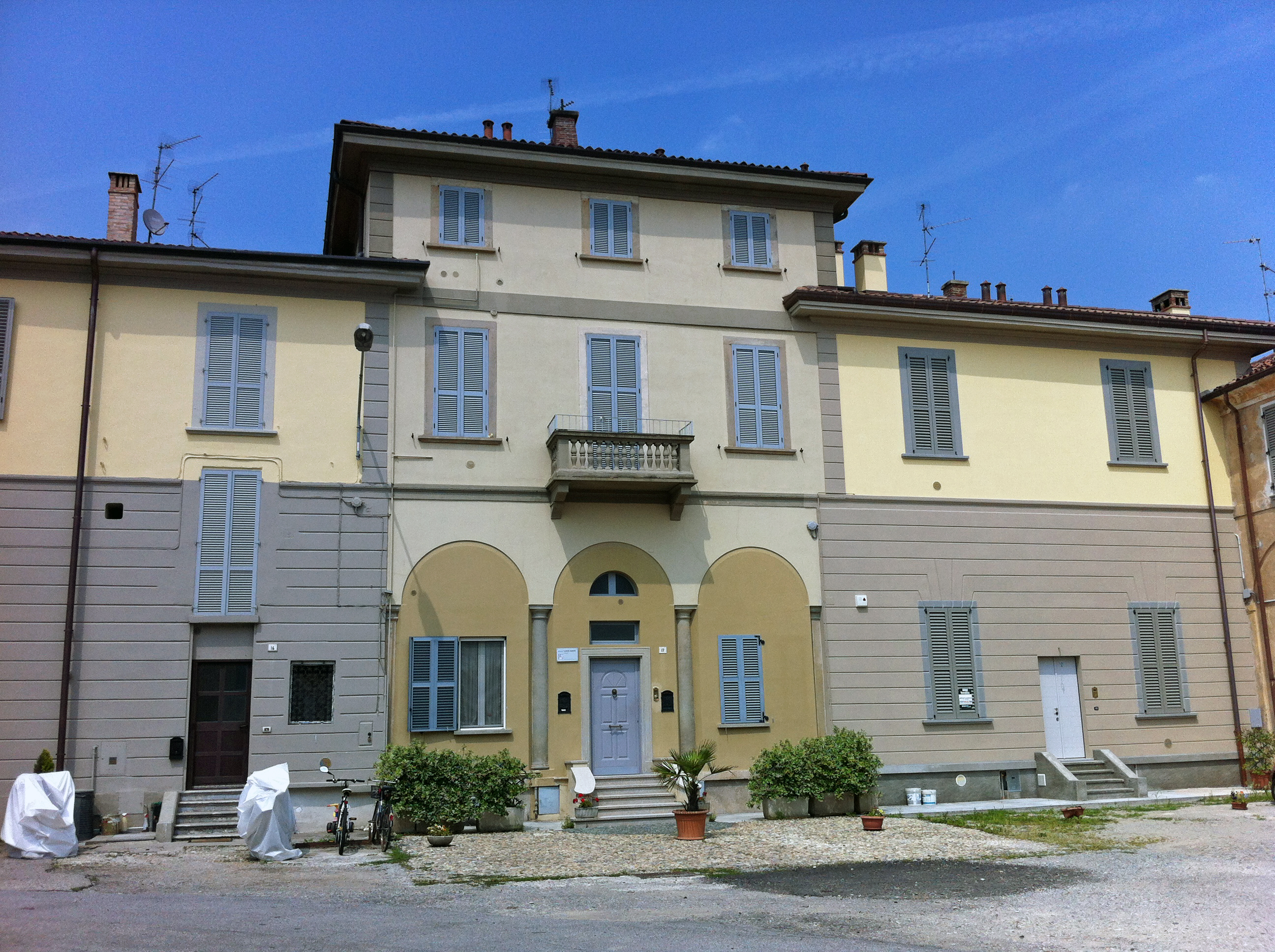 Palazzo Durini, XVI secolo, Arcore